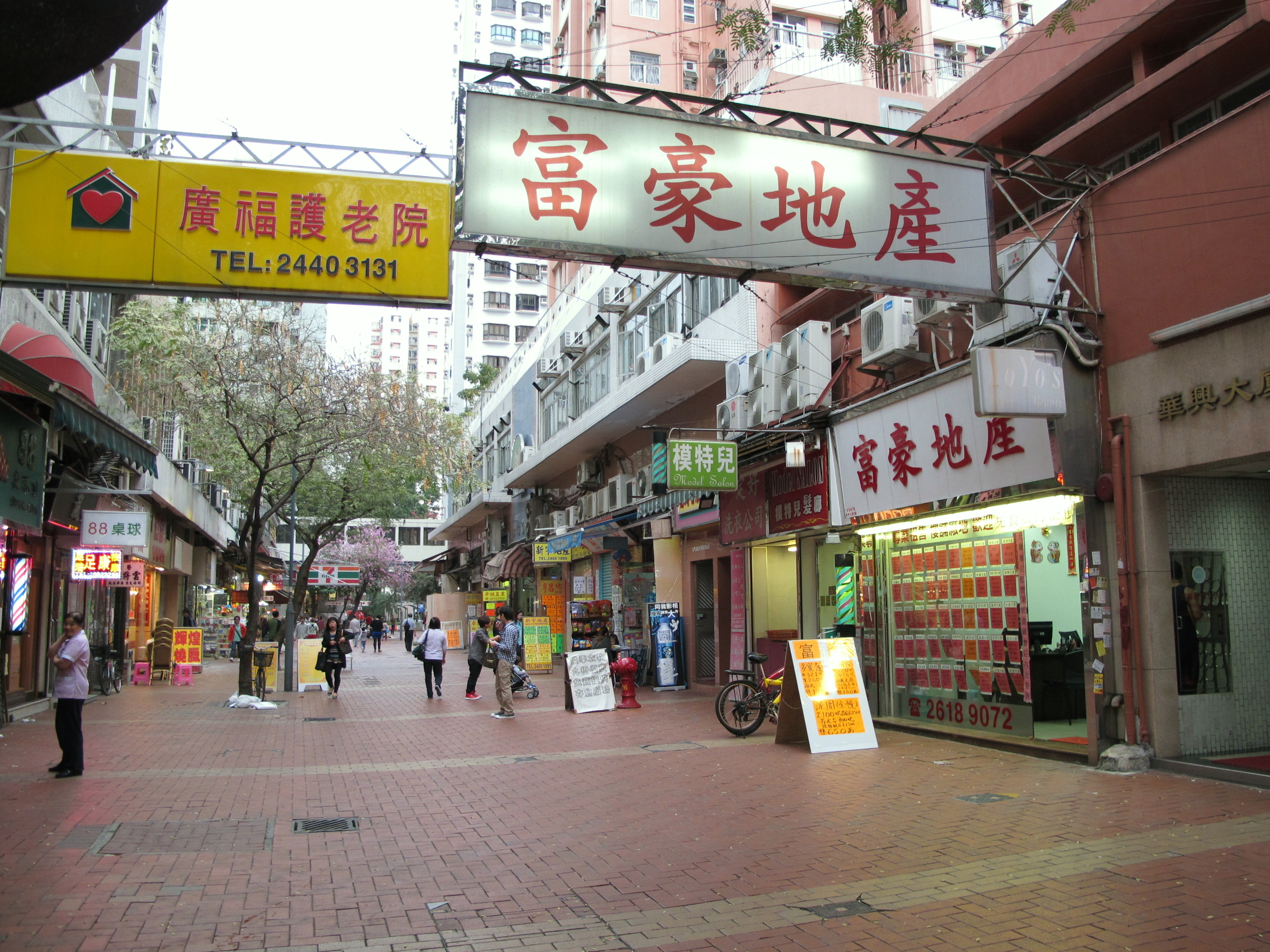 Tuen Mun Hung Kiu Tsing Ling Path